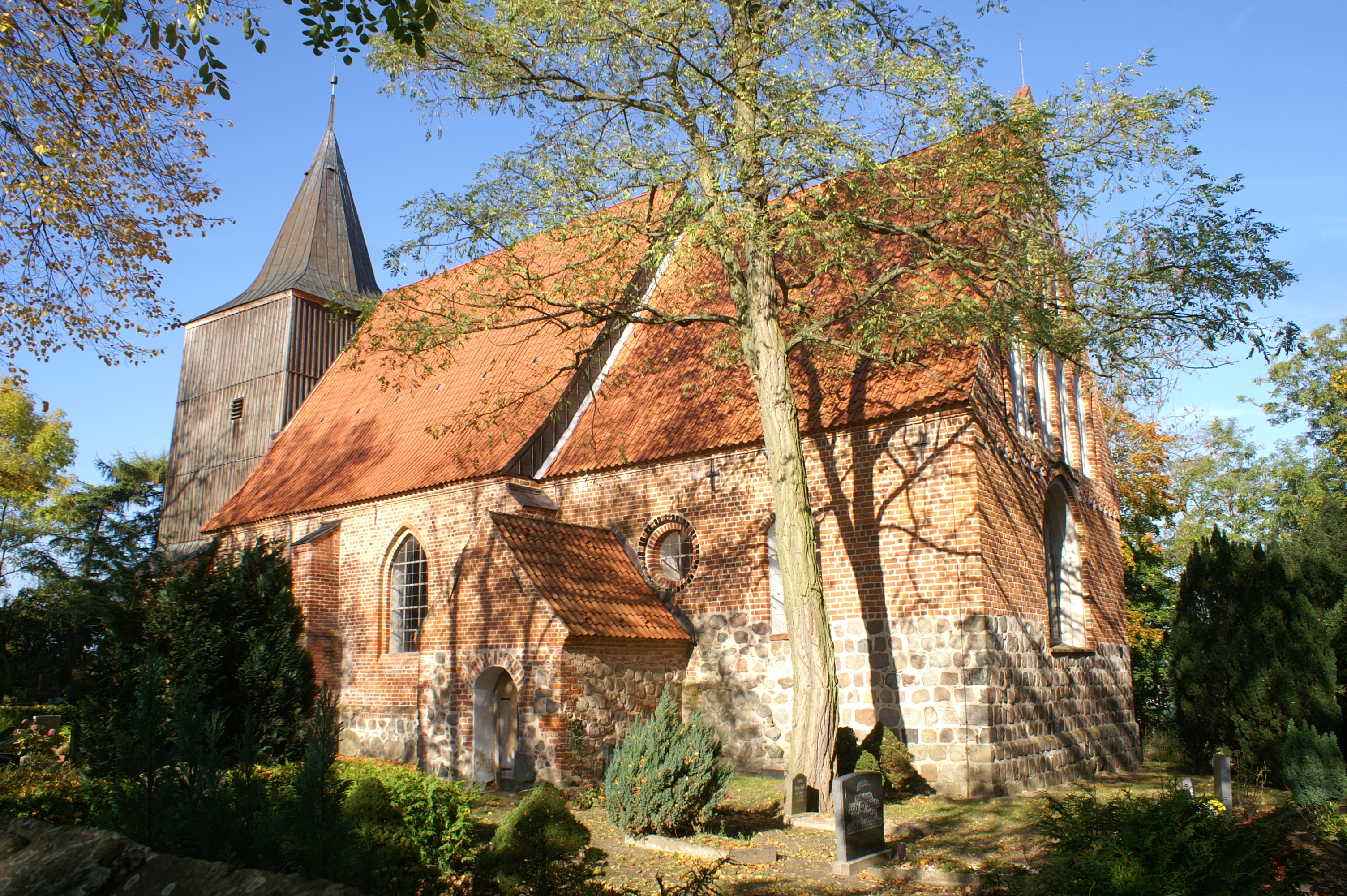 Dorfkirche in Hohendorf - Landkreis Ostvorpommern